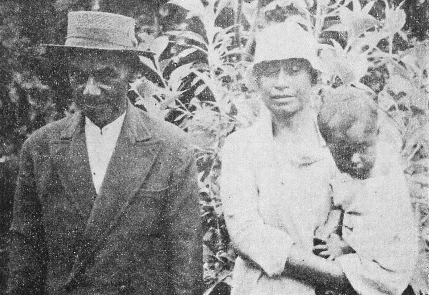 Juan Tepano, el artista de la Isla con su esposa y un hijo 59 Image from page 468 of "Boletin de la Sociedad de Biología de Concepción" (1927) Title: Boletin de la Sociedad de Biología de Concepción Identifier: boletindelasocie16192732soci Year: 1927 (1920s) Authors: Sociedad de Biología de Concepción; Sociedad de Bioquímica de Concepción; Universidad de Concepción Subjects: Sociedad de Biología de Concepción; Biology; Biology Publisher: Concepción [Universidad de Concepción]